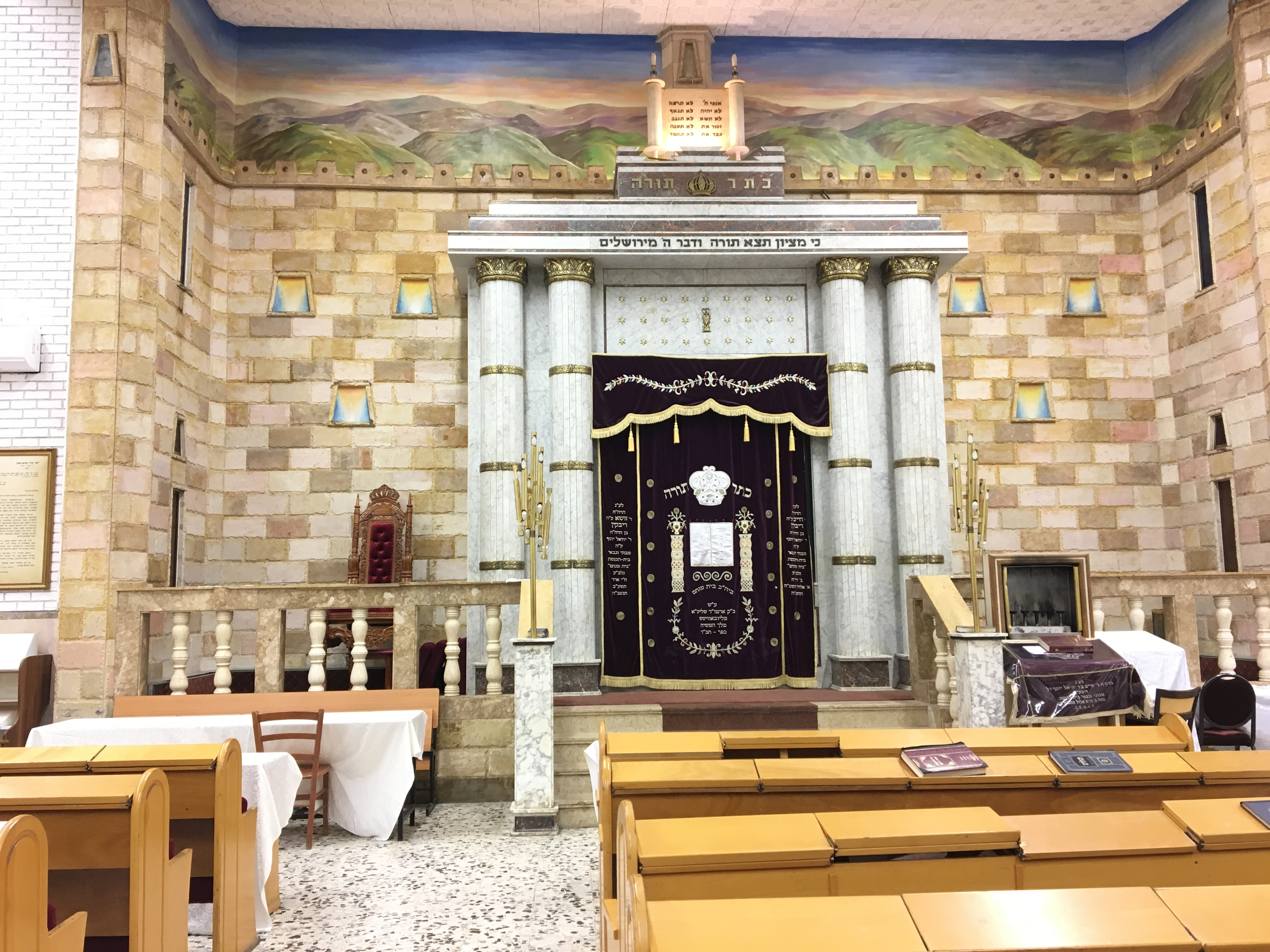 צד המזרחי בבית הכנסת בית מנחם